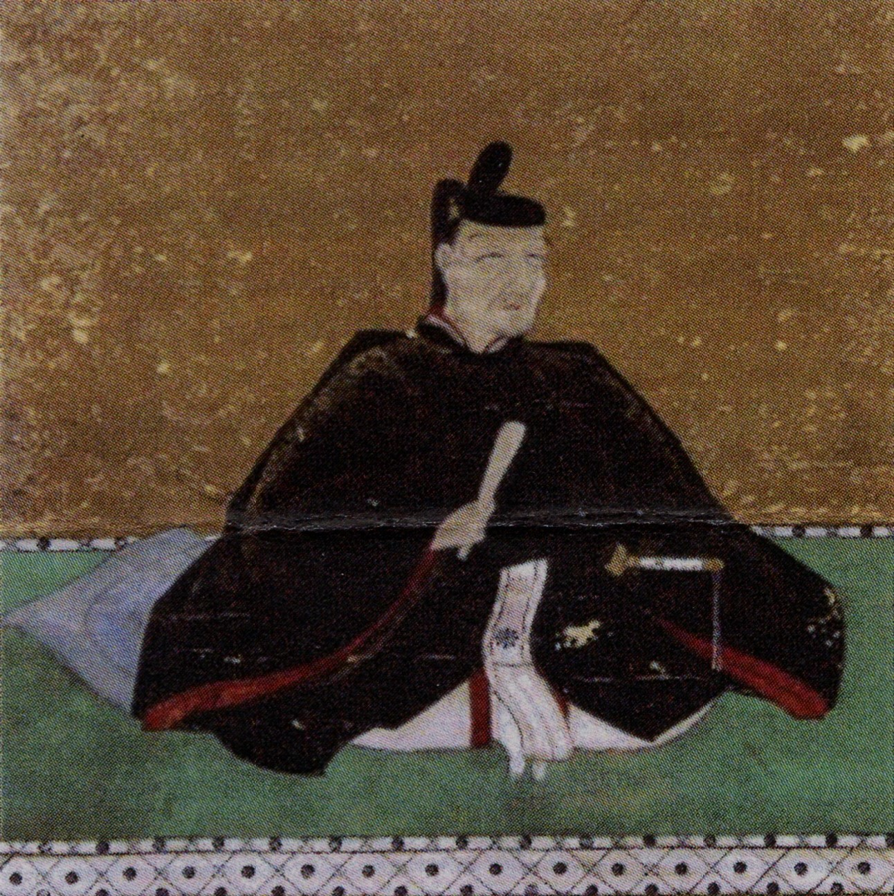 土井利益の肖像。